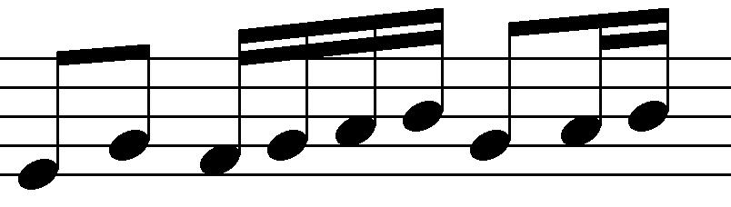 2 croches avec lien, 4 doubles croches avec lien, 1 croche et 2 doubles croches. libre de droit